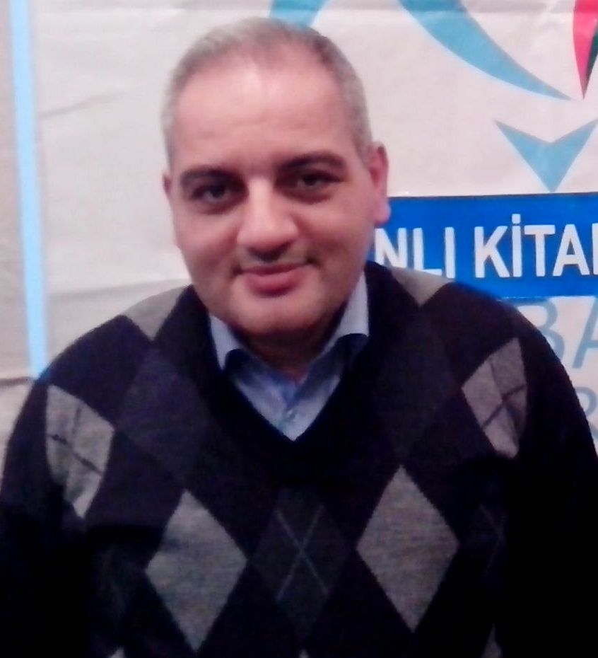 Azərbaycan Gənclər Fondunun dəstəyilə Sumqayıtda "Canlı Kitab" sərgisində iştirak edən sumqayıtlı gənc aktivist: Rüstəm Sadıqzadə